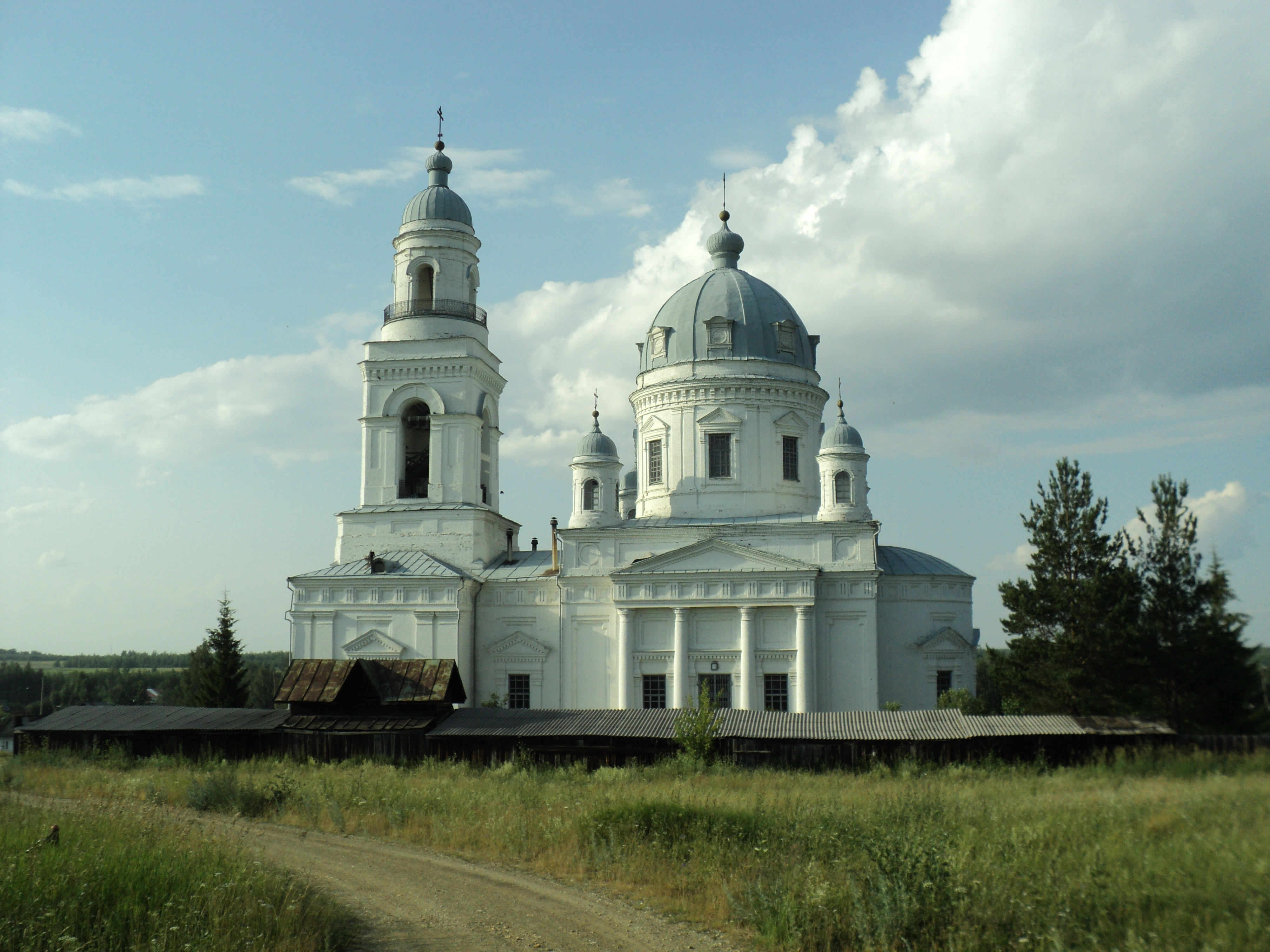 Церковь александра невского (Свердловская область, Невьянск, село шурала)